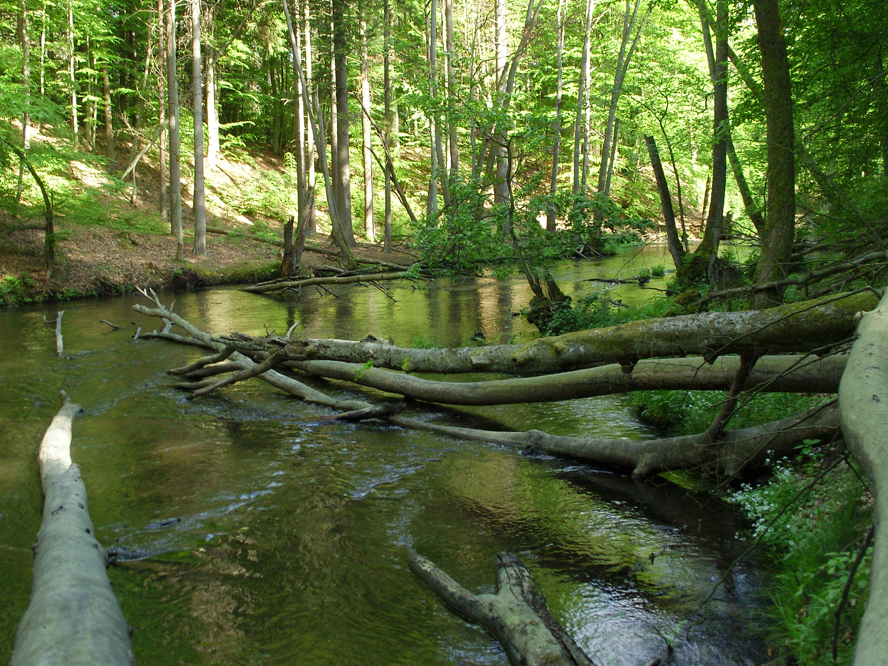 Brda